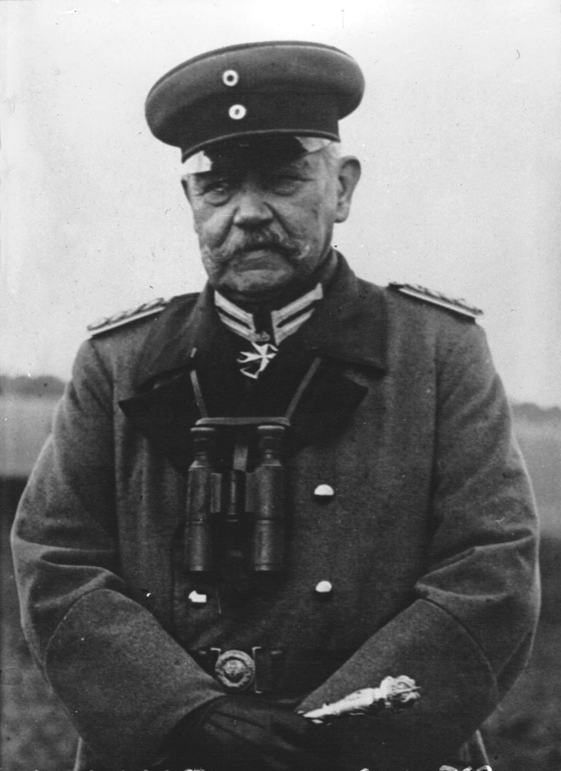 General Paul Von Hindenburg.